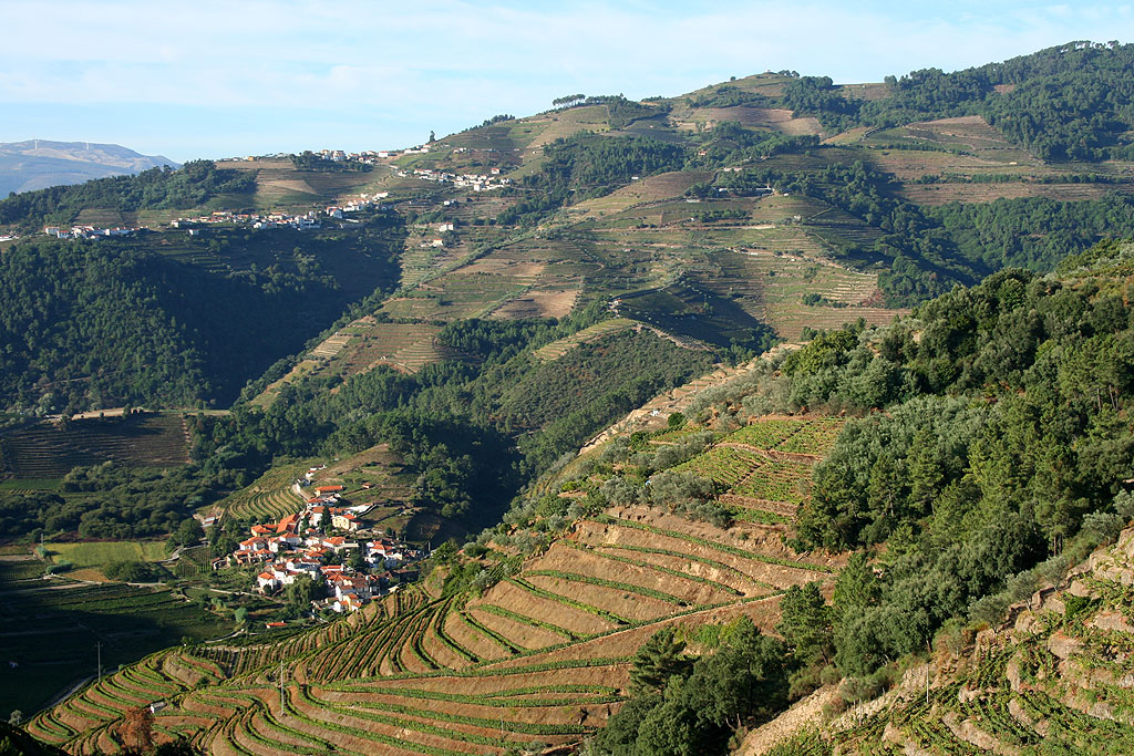 Santa Marta de Penaguião - Alto Douro Vinhateiro This file was uploaded for Wiki Loves Monuments in Portugal with the unique identifier 8983641.